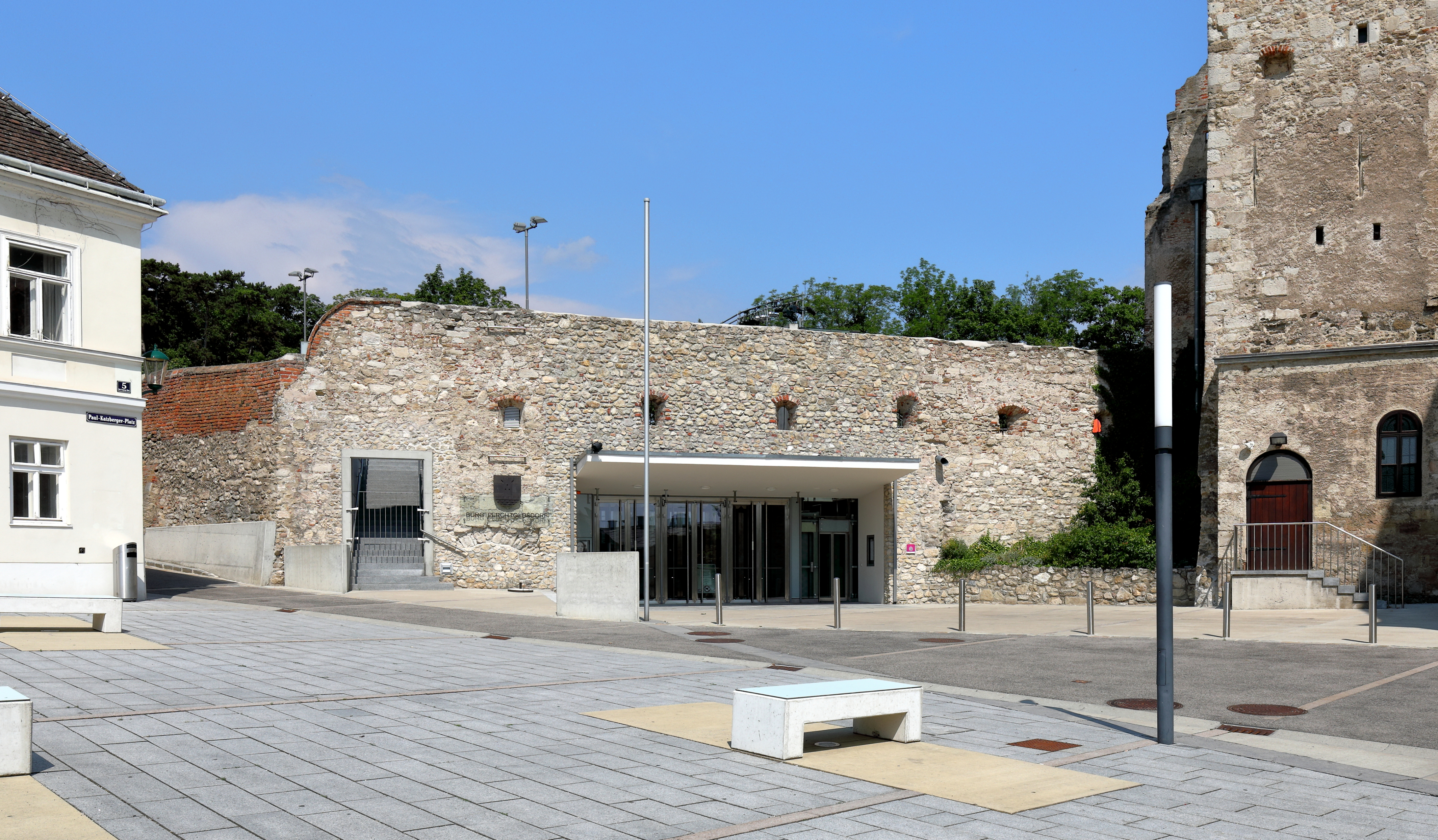 Der Burgvorplatz mit dem Haupteingang zur Burg (neuer Burgsaal, unteres & oberes Vestibül, Rüstkammer und Festsaal) sowie der Sommerspiele in der niederösterreichischen Marktgemeinde Perchtoldsdorf.Der ganze Bereich wurde von 2008 bis 2010 um rund 9 Mio. umgebaut. Dabei wurde unter anderem auch der neue Burgsaal, ein Veranstaltungssaal für bis zu 400 Personen, unter dem ehemaligen Burghof errichtet. Dieser wird auch als wetterfeste Ersatzspielstätte bei den Sommerspielen Perchtoldsdorf genutzt.